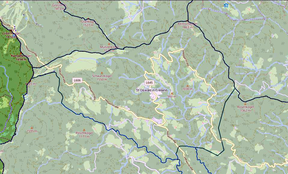 Gebiete der Pfarre St Oswald in Freiland 2018: die Pfarre ist größer als die ehemalige Gemeinde Kloster, die Pfarre umfasst auch im Wesentlichen den Bereich Dorfstatt in der Katastralgemeinde Sallegg der (ehemaligen) Gemeinde Bad Gams bis etwa (inkl.) Simihansl und Adambauer (nicht mehr jedoch Großmichl und Höllbauerntoni) im Süden des Rosenkogel-Gipfels. Die Pfarrgrenze verläuft (sonst nach der Gemeindegrenze von Kloster, aber in diesem Bereich:) vom Absetzwirt süd-südwestlich und kurz unterhalb des Anwesens Simihansl nach Westen zu dem Punkt, an dem die Grenze der Katastralgemeinde Klosterwinkel das Wildbachtal verlässt, ab dann folgt die Pfarrgrenze wieder der KG-Grenze.